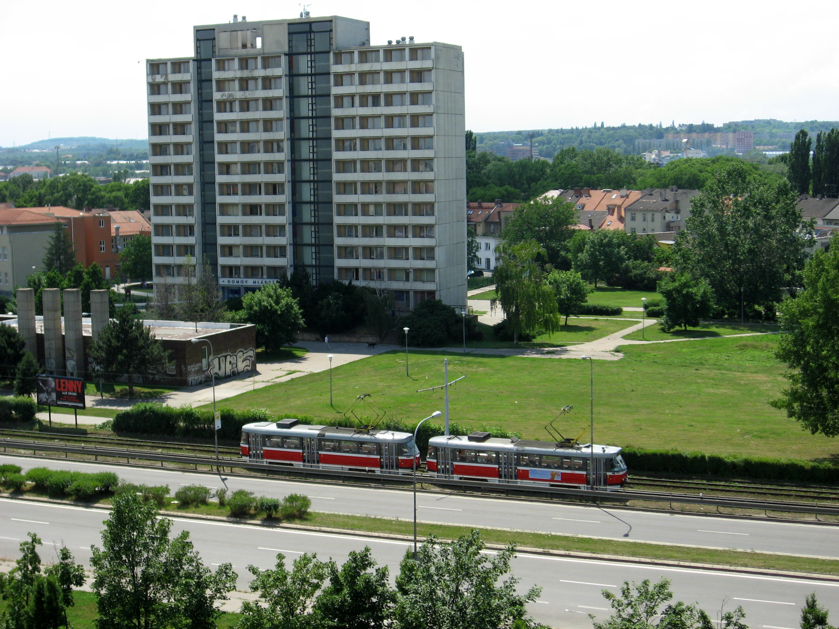 Brno-Komárov